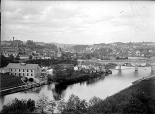 Fonds Trutat - Photographie ancienne Cote : TRU C 1722 Localisation : Fonds ancien (S 30) Original non communicable Titre : Vue générale de Limoges depuis le train, mai 1899 Auteur : Trutat, Eugène Rôle de l’auteur : Photographe Lieu de création : Limoges (Haute-Vienne) Date de création : 1899 Mesures : : 5 x 6 cm Observations : Note manuscrite deTrutat : " Mai 1899, Limoges (dans le train) ". Mot(s)-clé(s) : -- Ville -- Maison -- Fleuve -- Pont -- Limoges (Haute-Vienne) -- Haute-Vienne (Limousin) -- Limousin (France) -- 19e siècle, 4e quart Médium : Photographies -- Négatifs sur plaque de verre -- Noir et blanc -- Vues de ville Bibliothèque de Toulouse. Domaine public